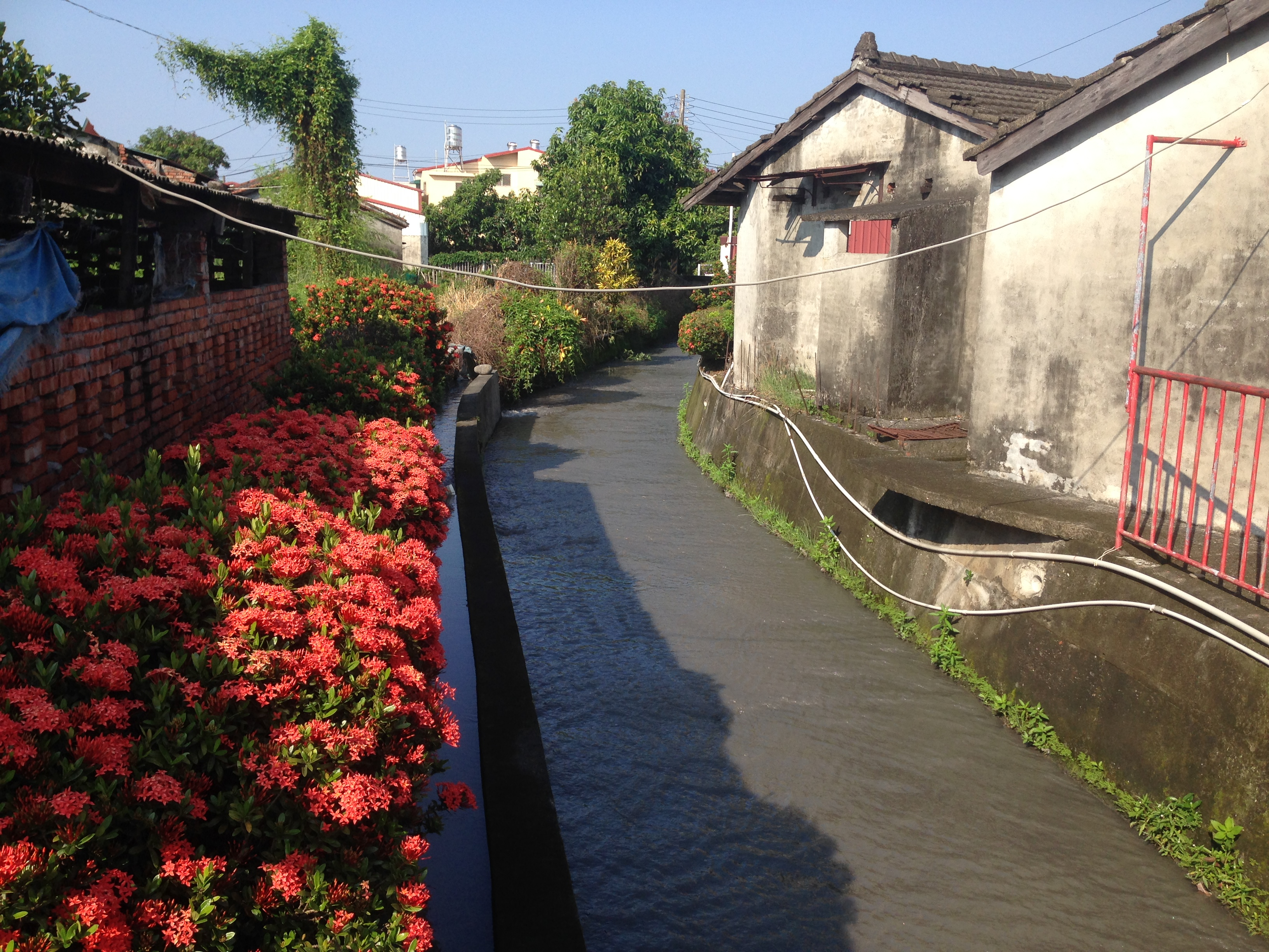 高樹鄉東興村文昌水圳